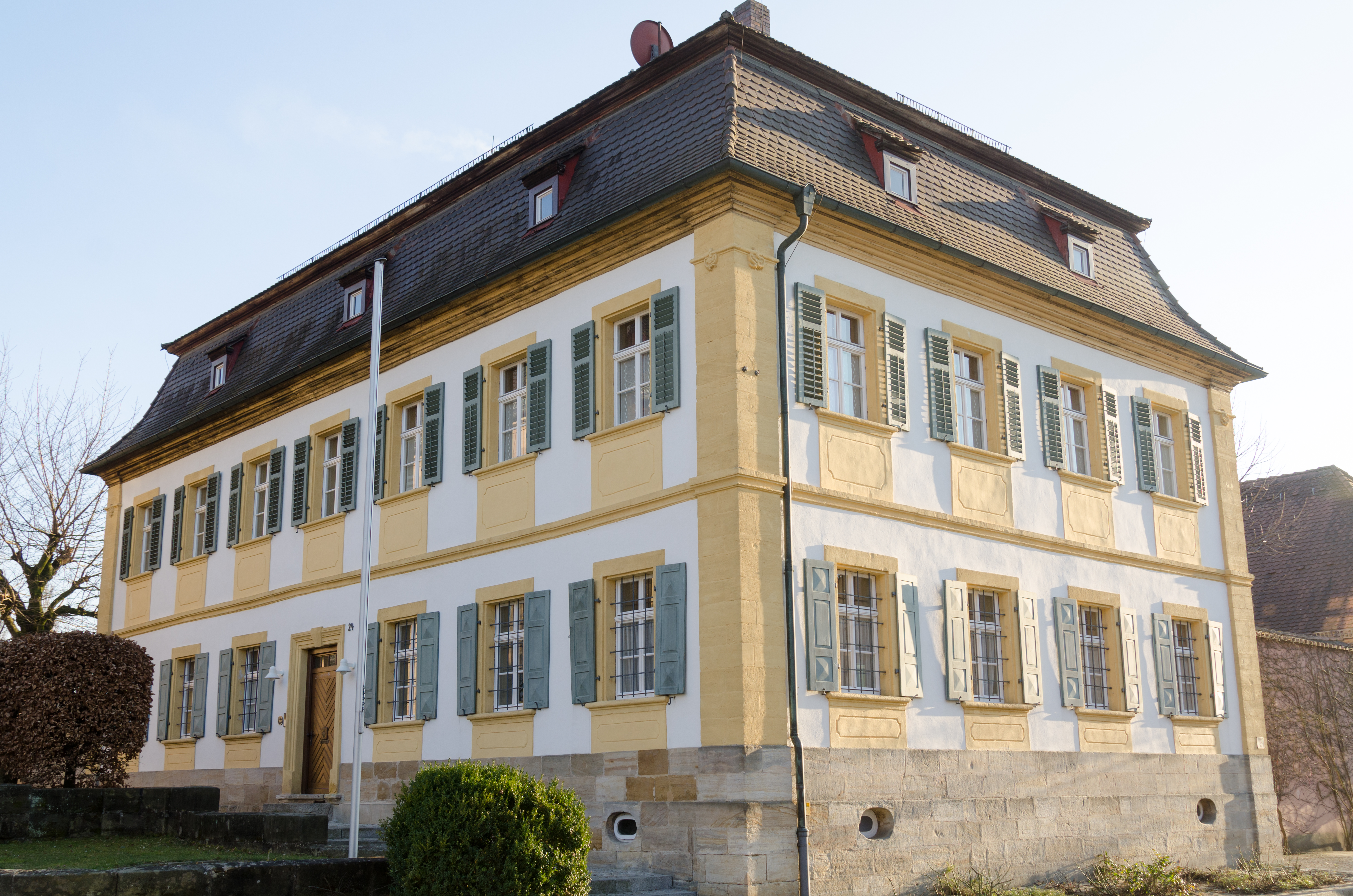 Buttenheim, Hauptstraße 24